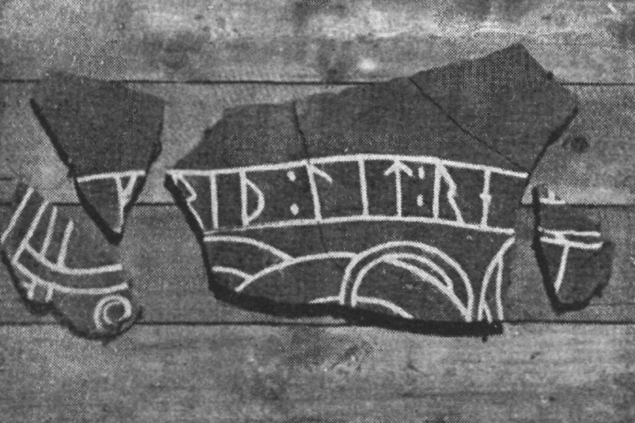 U 853. Skolhuset, Balingsta sn. Foto av O. v. Friesen.